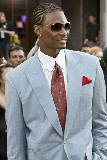 MMVAs